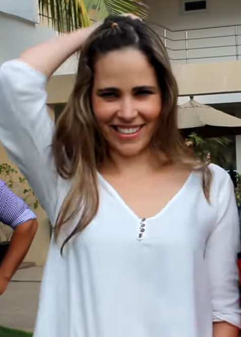 Entrevista de Margarita Magaña